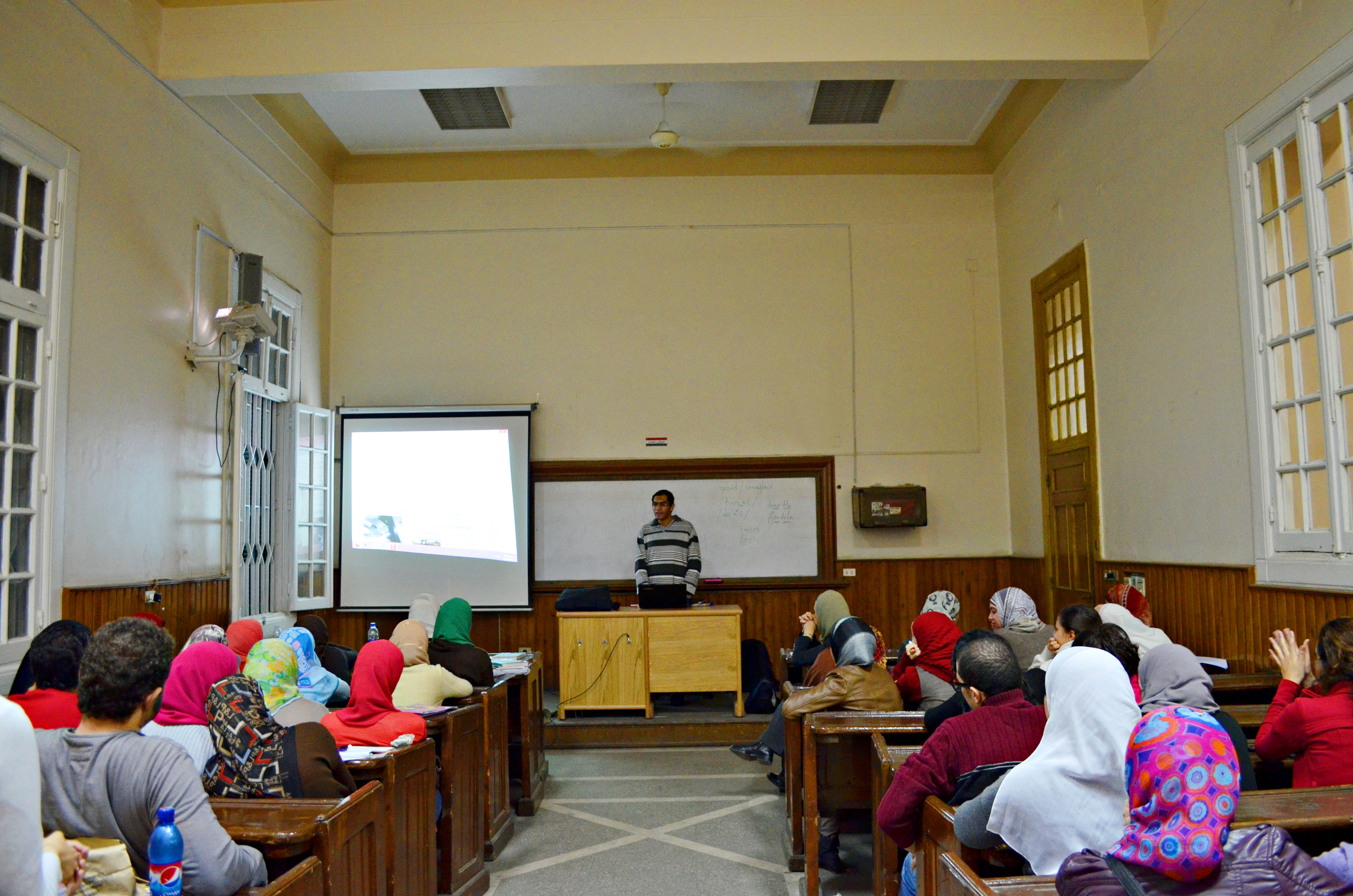 أثناء شرح محمد عودة لطلاب في كلية الأداب جامعة القاهرة في برنامج ويكيبيديا للتعليم.